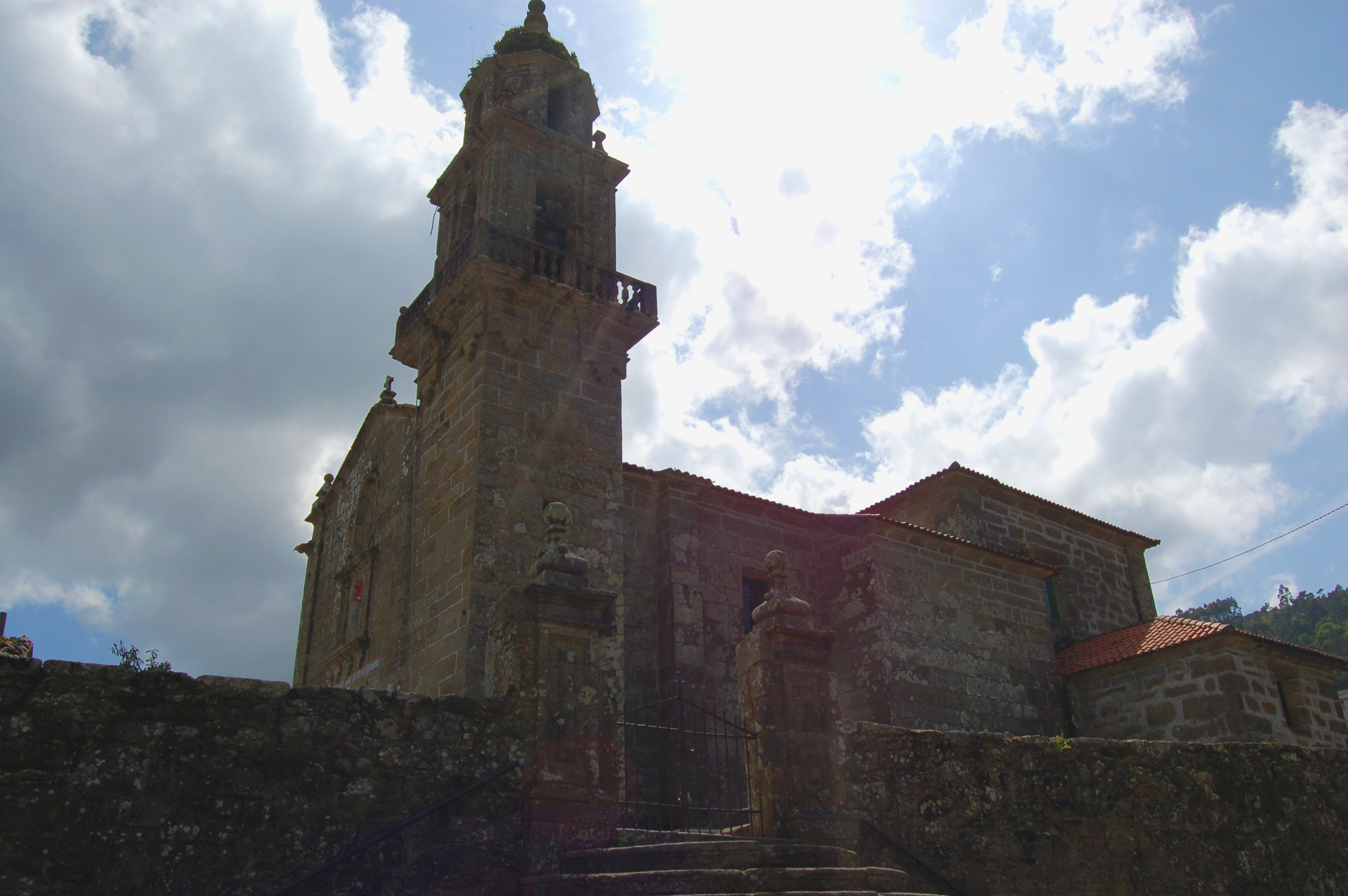 Igrexa parroquial de Santa María de Argalo (Noia)